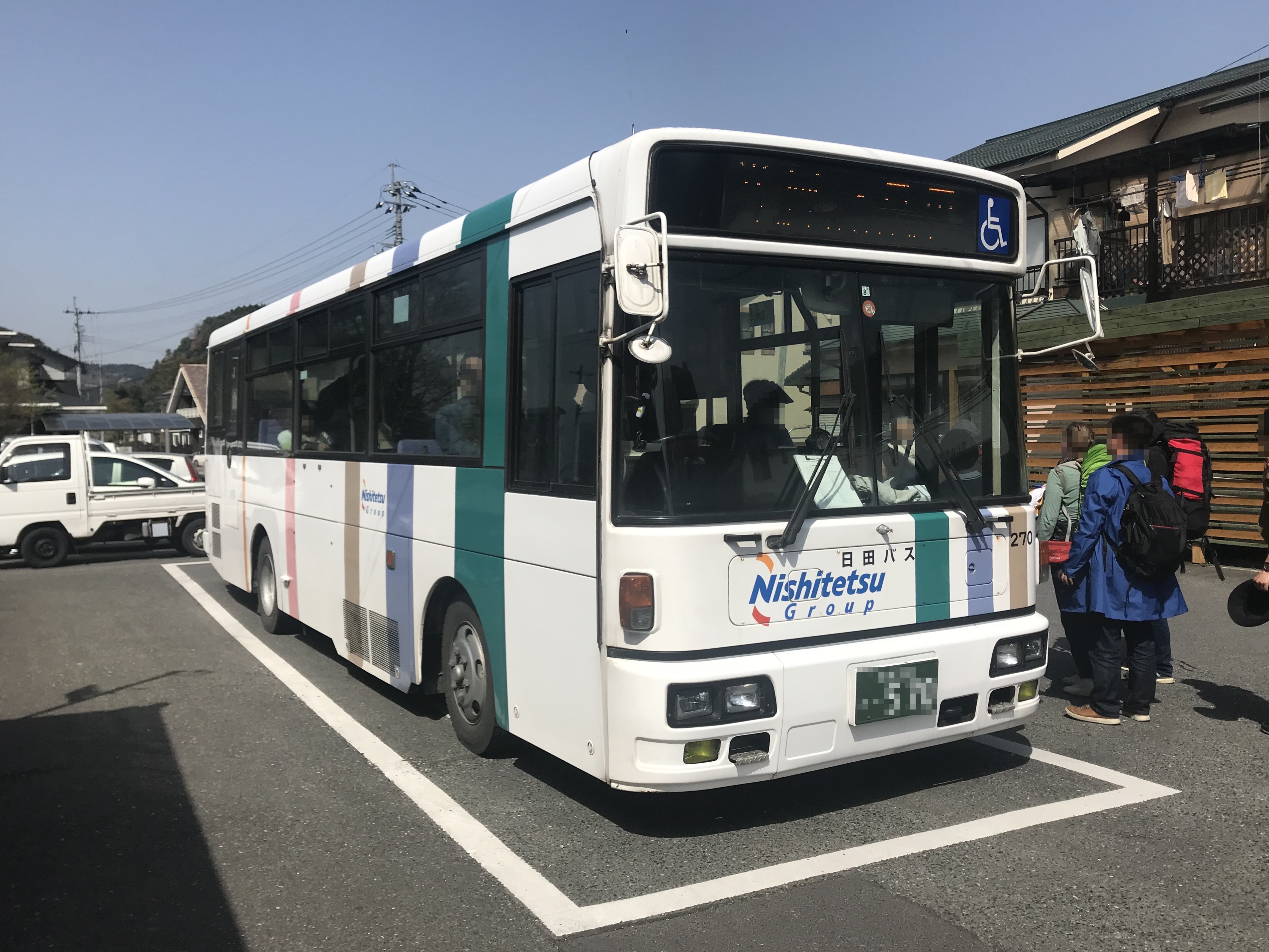 光岡駅前の日田行き鉄道代行バス